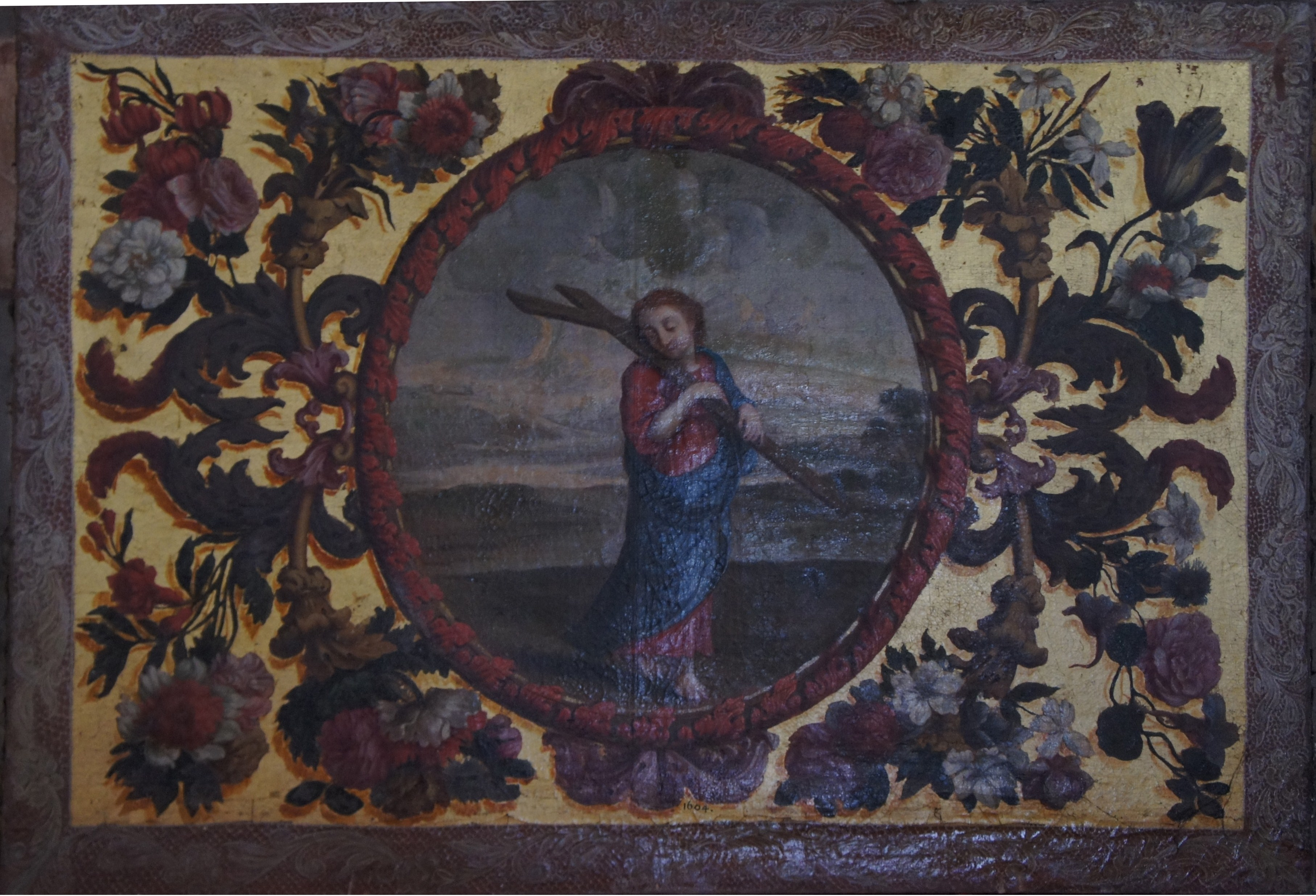 Intérieur de l'église . L' Enfant Jésus portant sa croix , antependium sur toile , peinture à l'huile de dimensions h = 76cm par la = 109 cm. Datant du XVIIe siècle . Recensé dans la base Palissy .